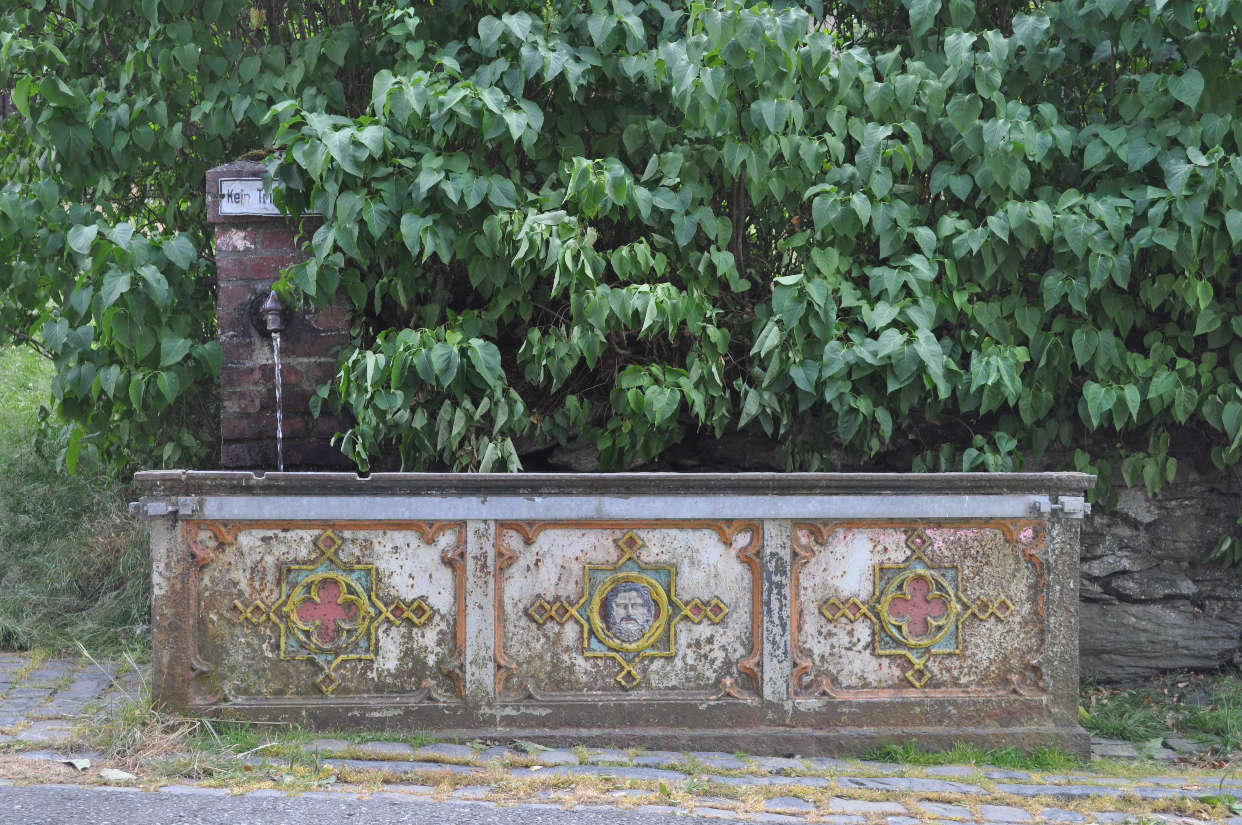 Unsanierter gusseisener Brunnen in Maulof